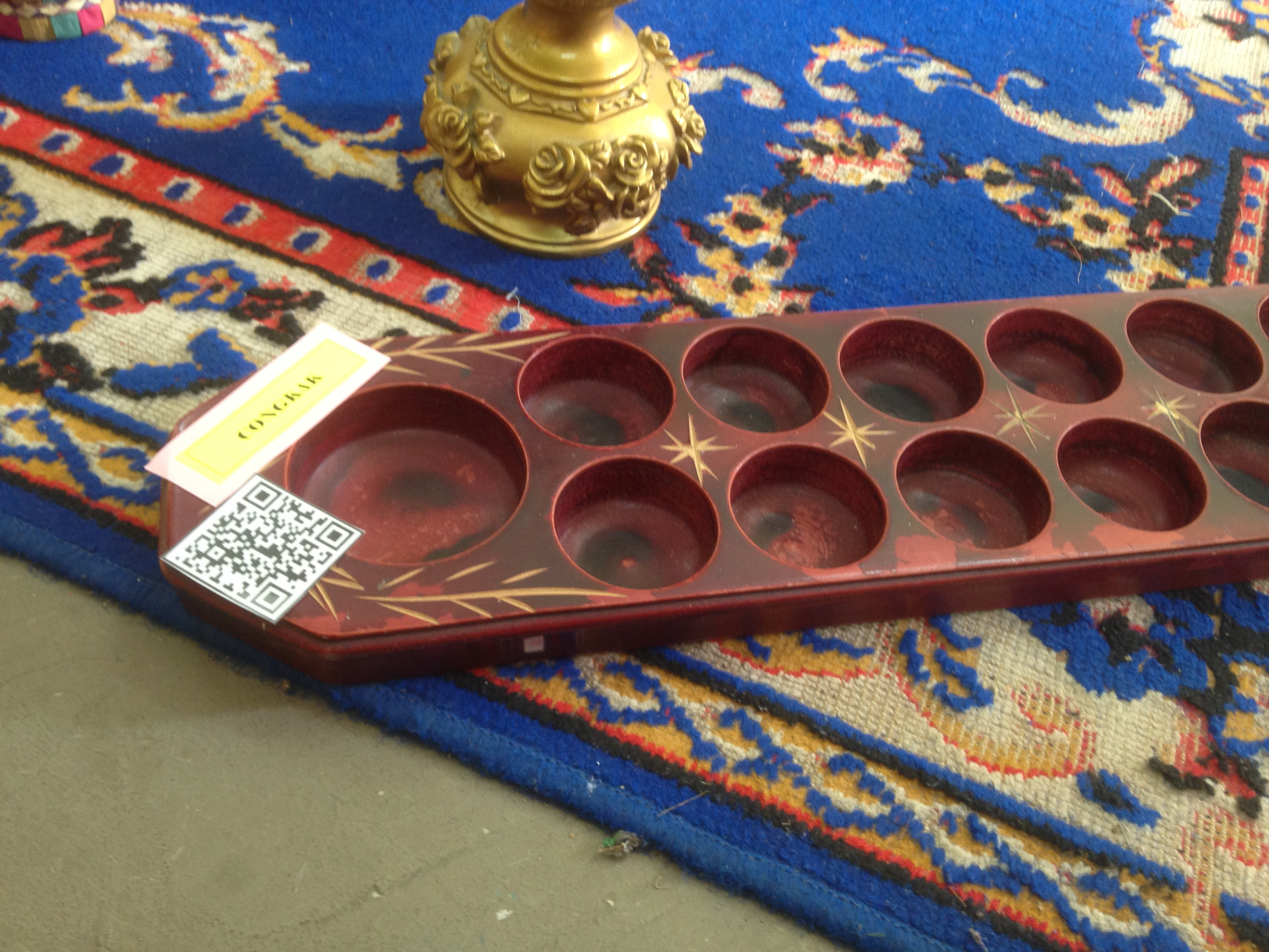 CONGKAK